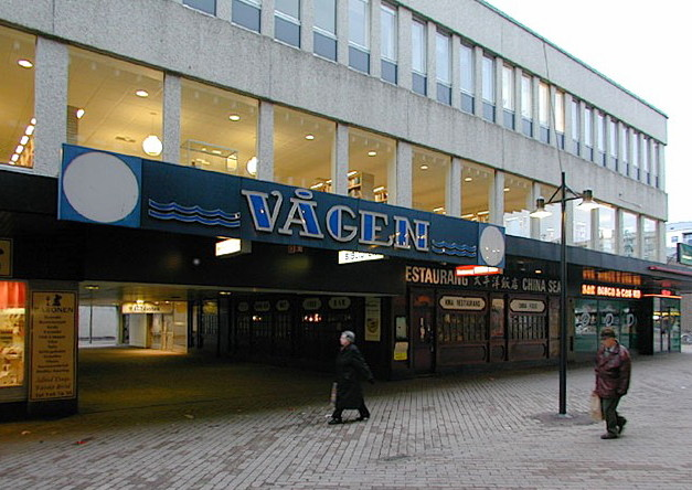 Ingången till biograf Vågen i Skärholmens centrum